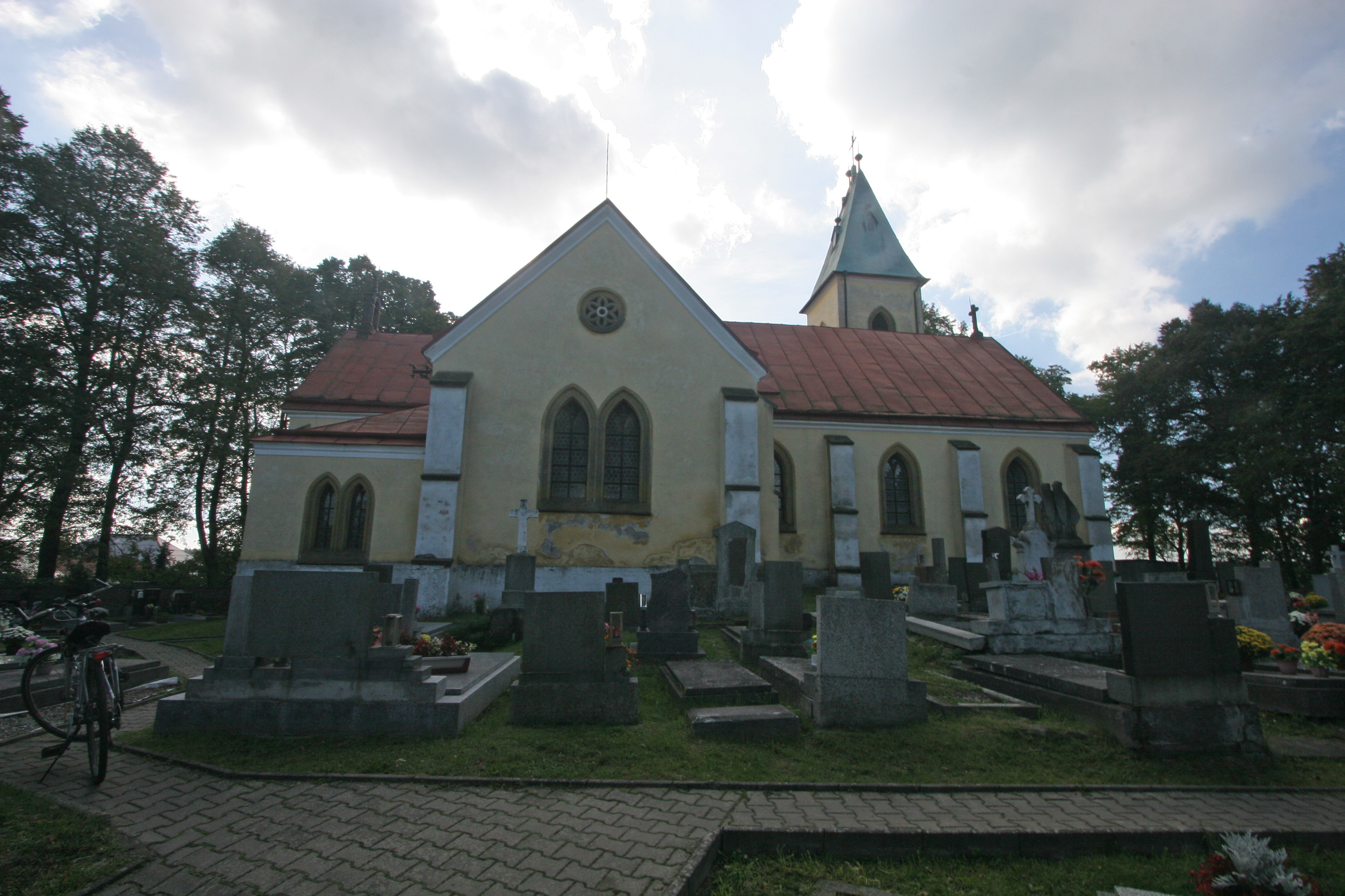 Míčov kostel sv. Matouše